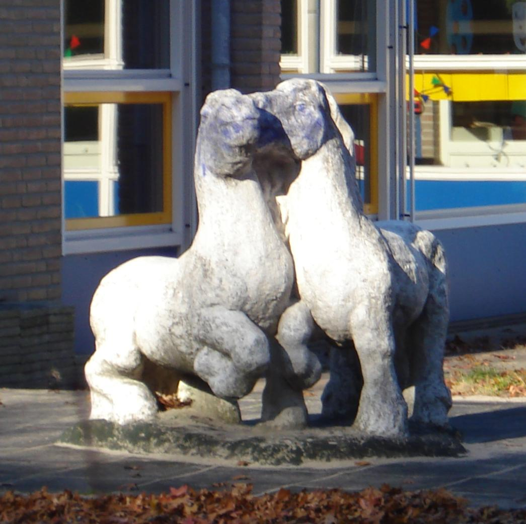 Soest, Smitsweg, school. Kunstwerk "Twee spelende paardjes" van Gijs Batelaan. Soest/The Netherlands. FOP.